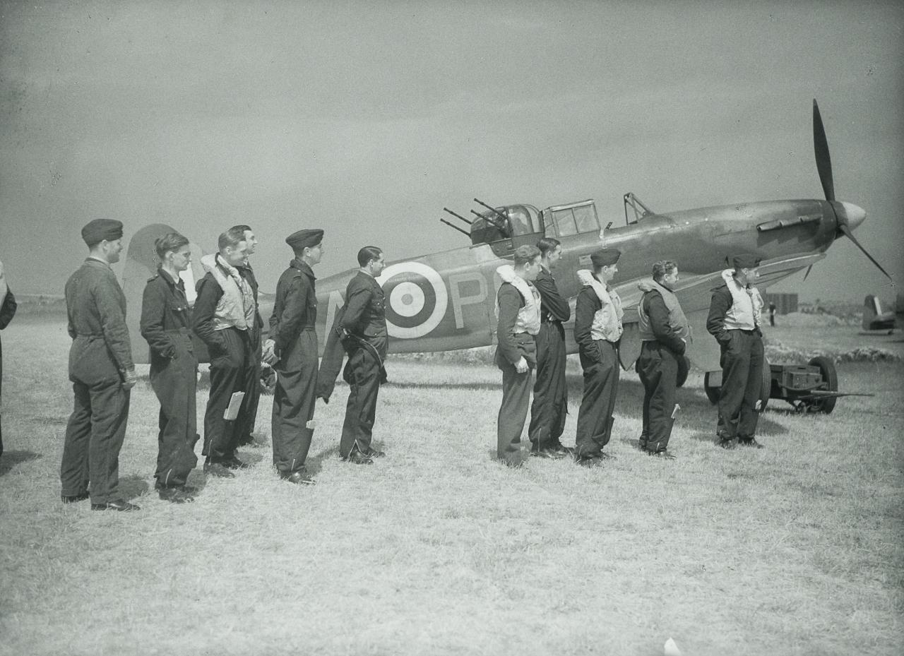 Airmen and World War II Boulton-Paul Defiant from No 264 Squadron. Identified thanks to comments below as being the squadron leader's aircraft, with some names suggested of those present: Squadron Leader Philip Algernon HUNTER (32081) DSO Sgt FJ Barker DFM Sgt ER Thorn See the extensive comments below for a huge amount of information about this squadron and some of its airmen.